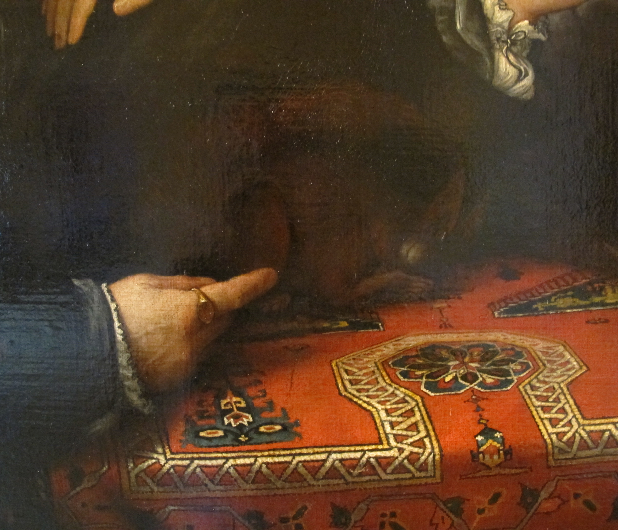 detail: Possibly squirrel